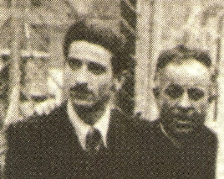 Il prof. Gesmundo (a sinistra) con Don Pietro Pappagallo (a destra)